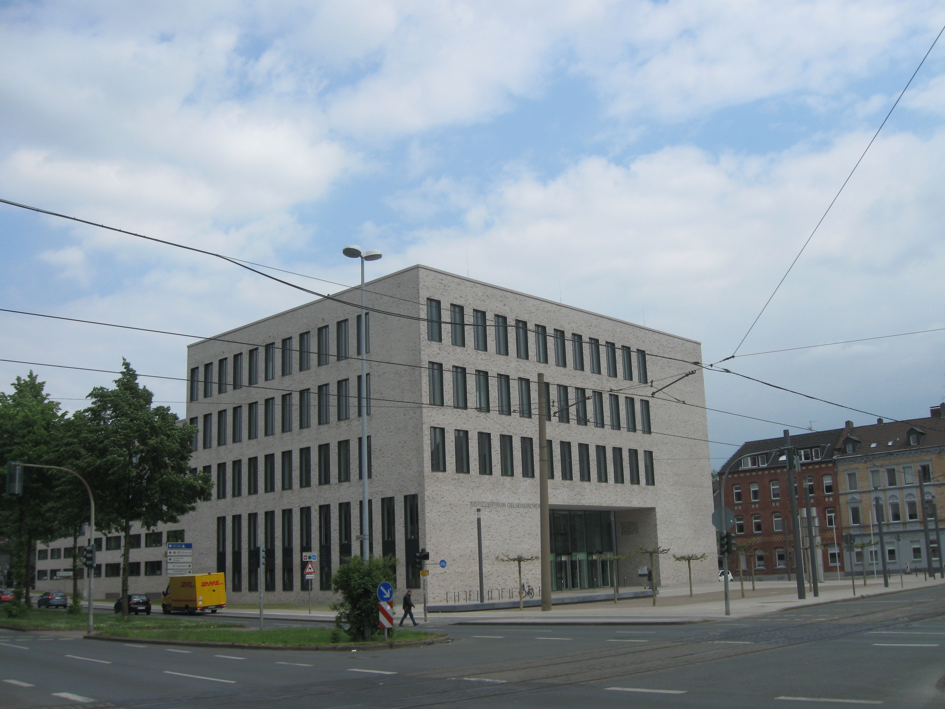 Justizzentrum Gelsenkirchen (Bochumer Straße 79, errichtet 2013–2015). Im Justizzentrum Gelsenkirchen sind seit Januar 2016 das Amtsgericht Gelsenkirchen, das Arbeitsgericht Gelsenkirchen und das Sozialgericht Gelsenkirchen untergebracht.